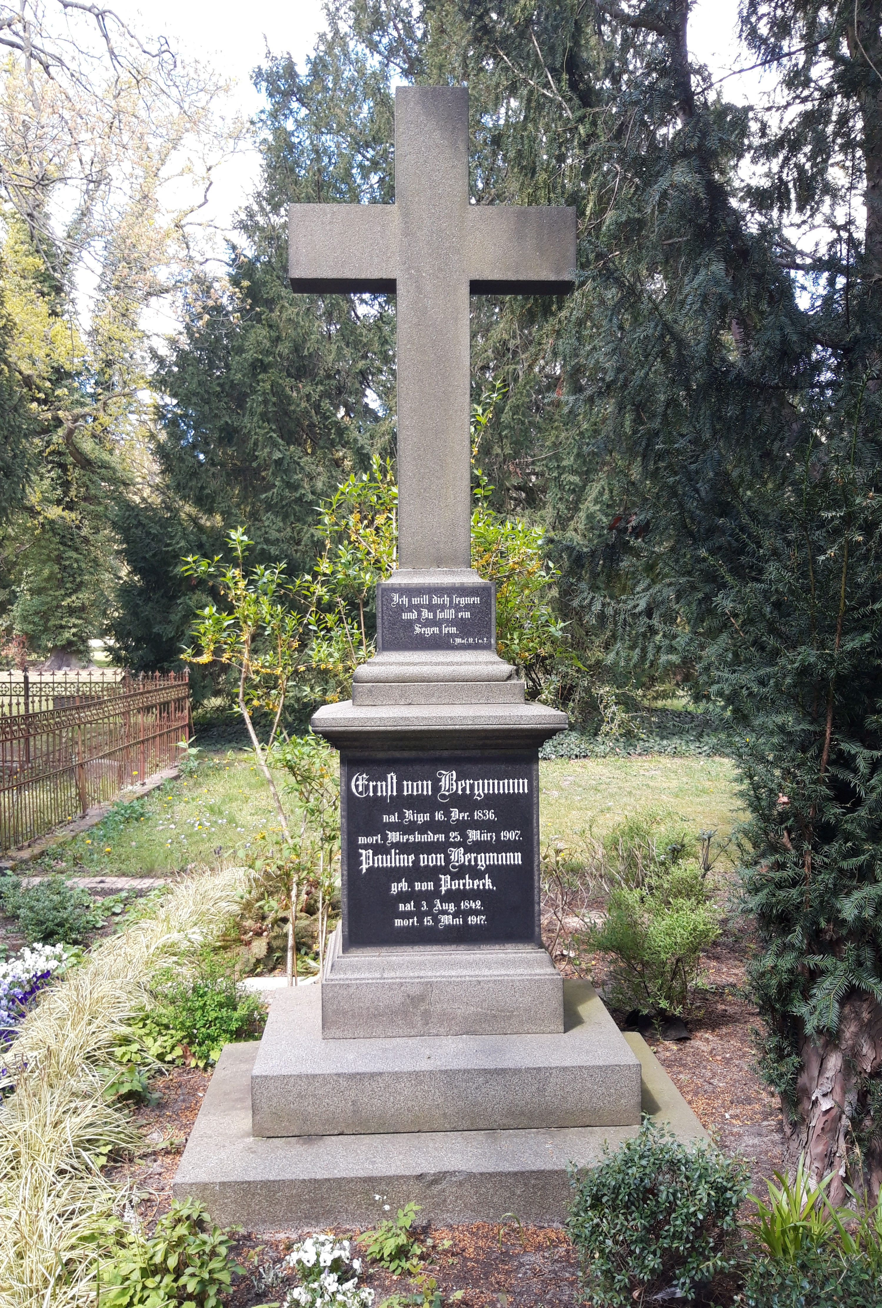 Grab Ernst von Bergmann auf dem Alten Friedhof Potsdam